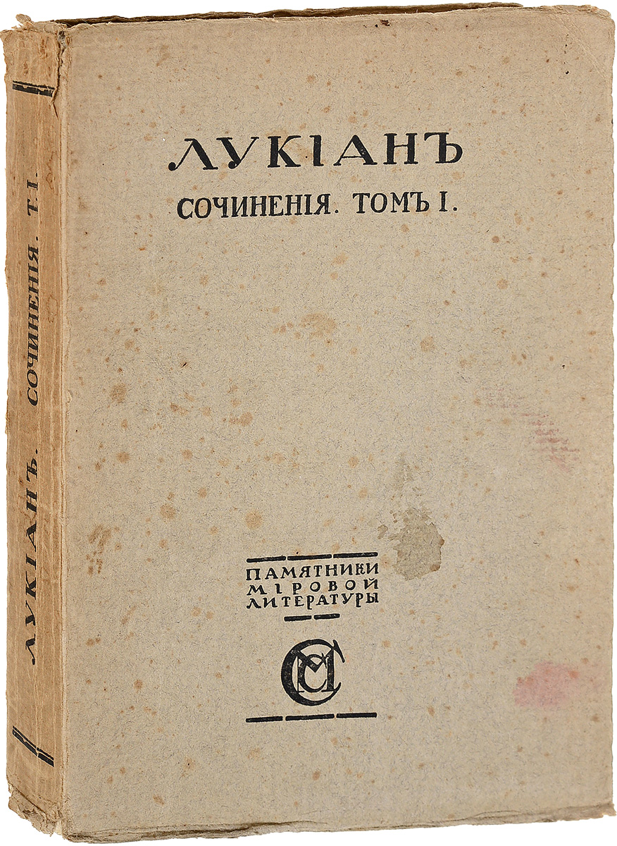 Книга — Лукиан. Сочинения. Том I. 1915 год. Часть переводов — Лукьянов, Сергей Сергеевич.